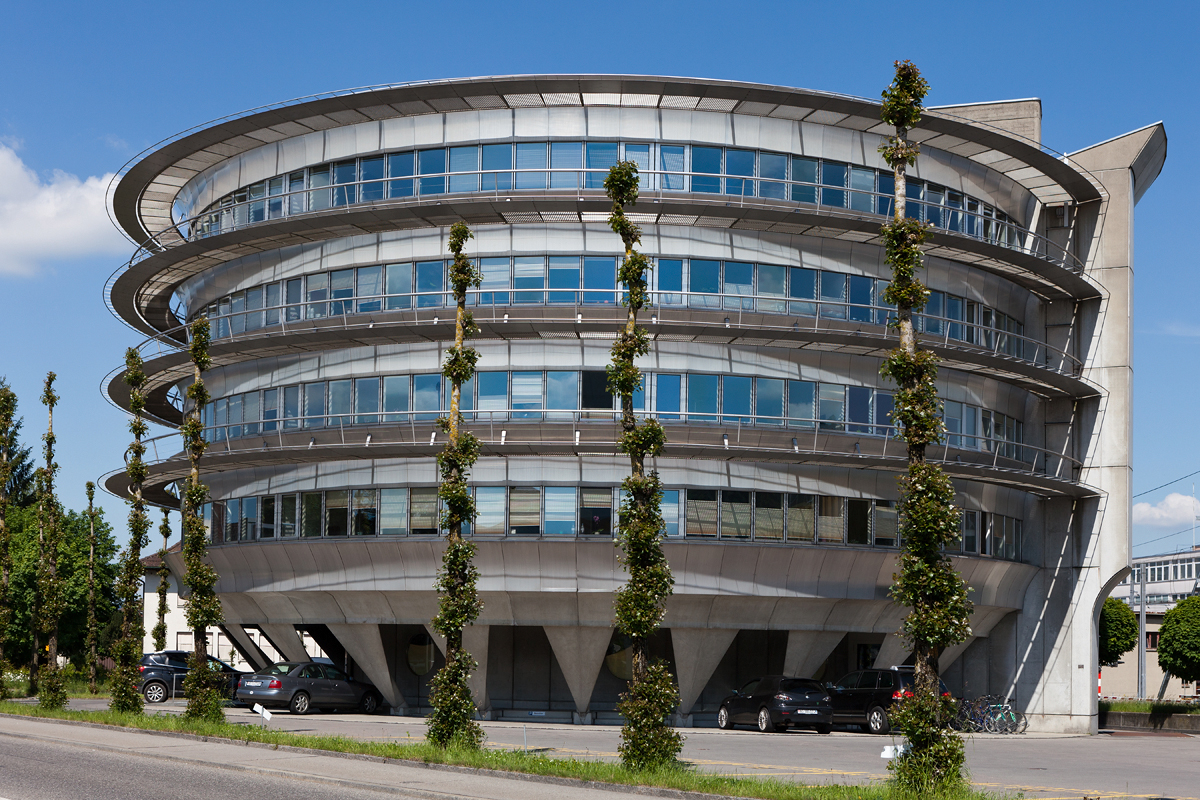 Gewerbebau von Santiago Calvatrava in Suhr